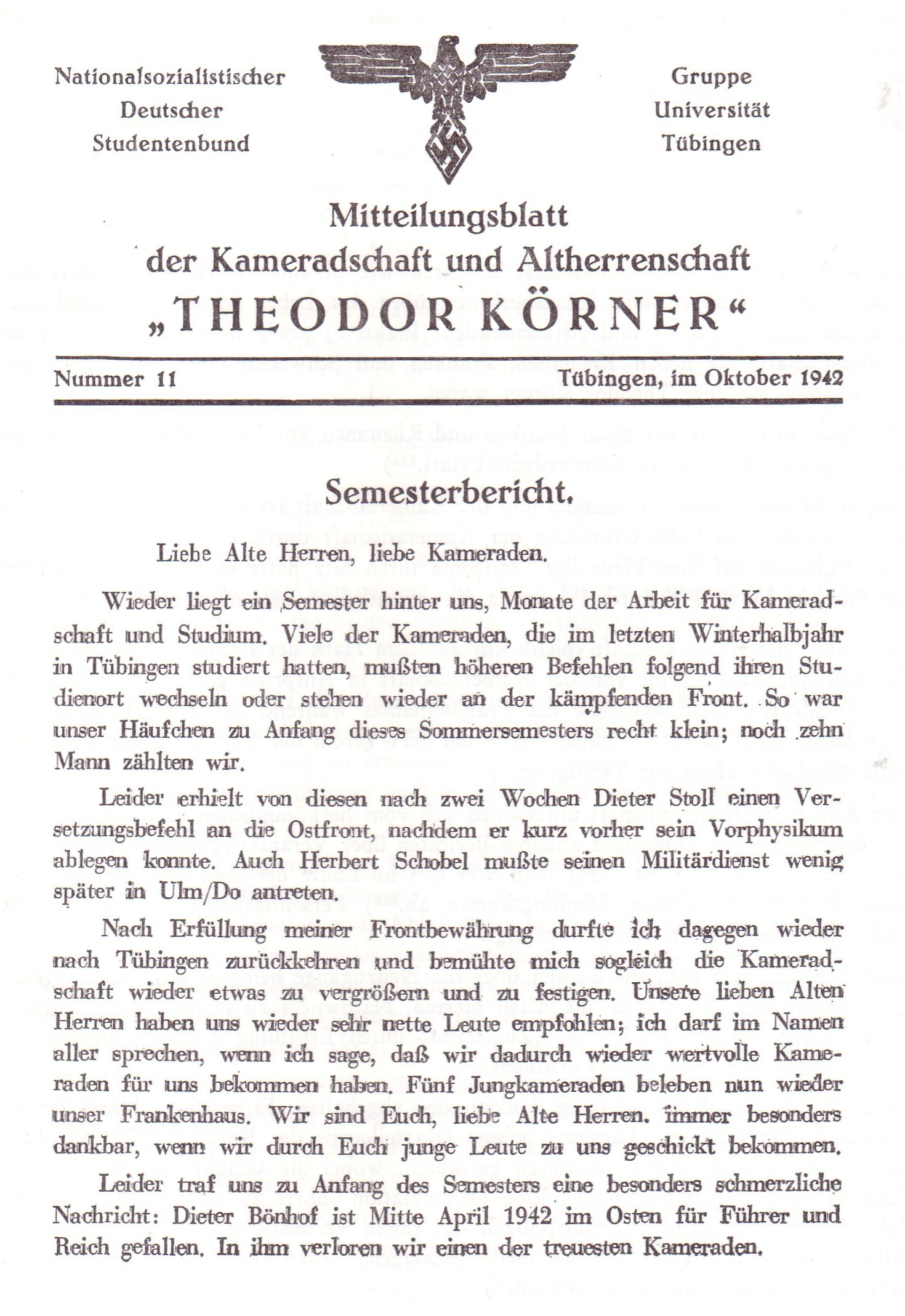 Semesterbericht der Tübinger Kameradschaft und Altherrenschaft Theodor Körner